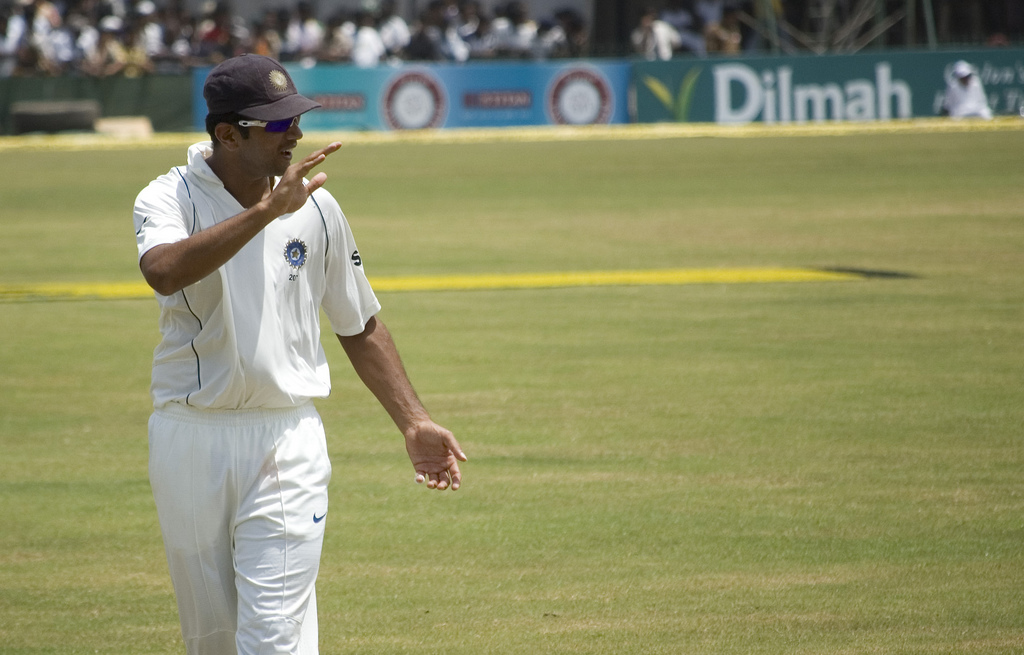 Rahul Dravid